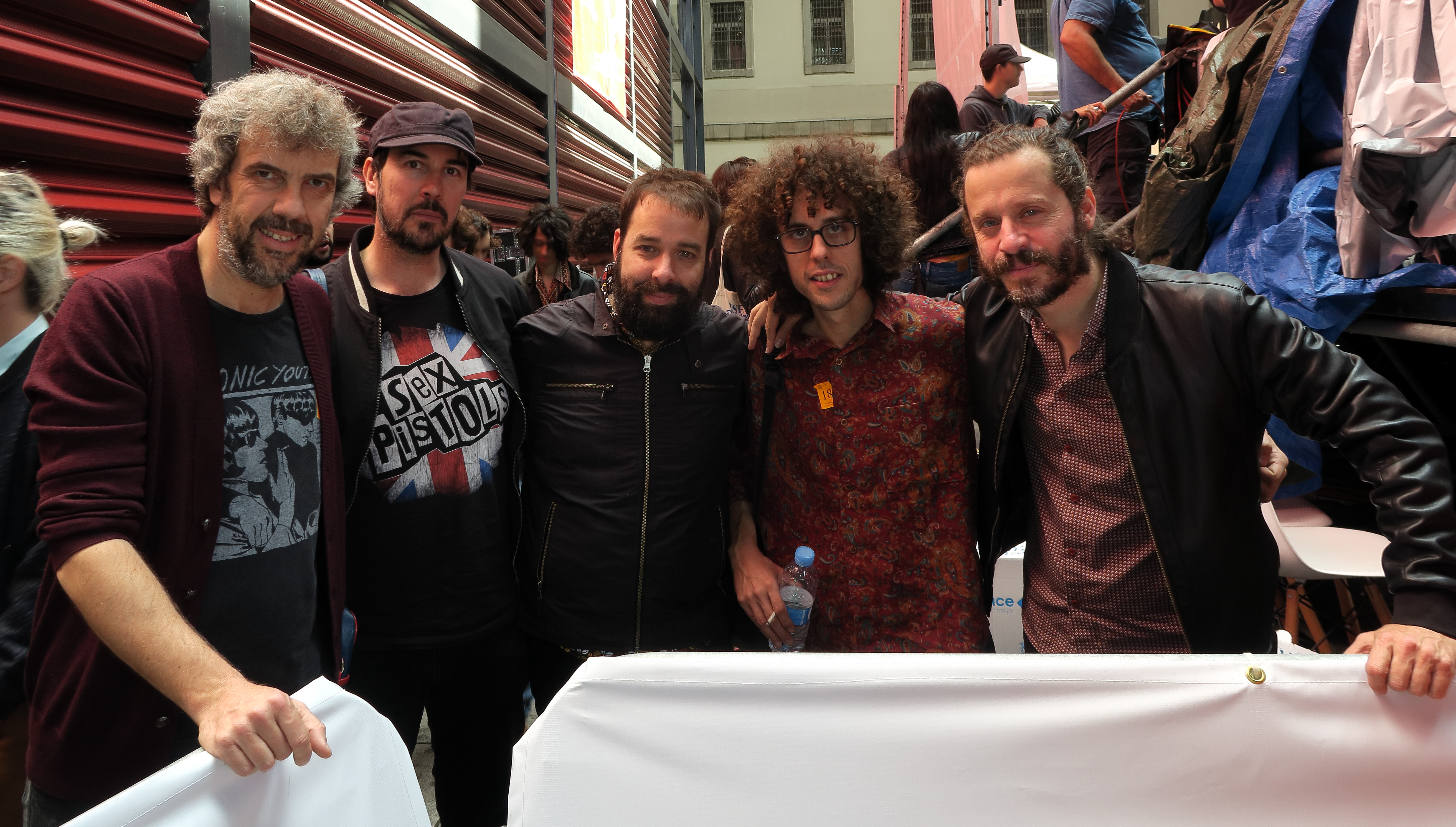 Niños Mutantes, 01, en el patio del Museo Nacional Centro de Arte Reina Sofía, Día de los Museos y Radio 3